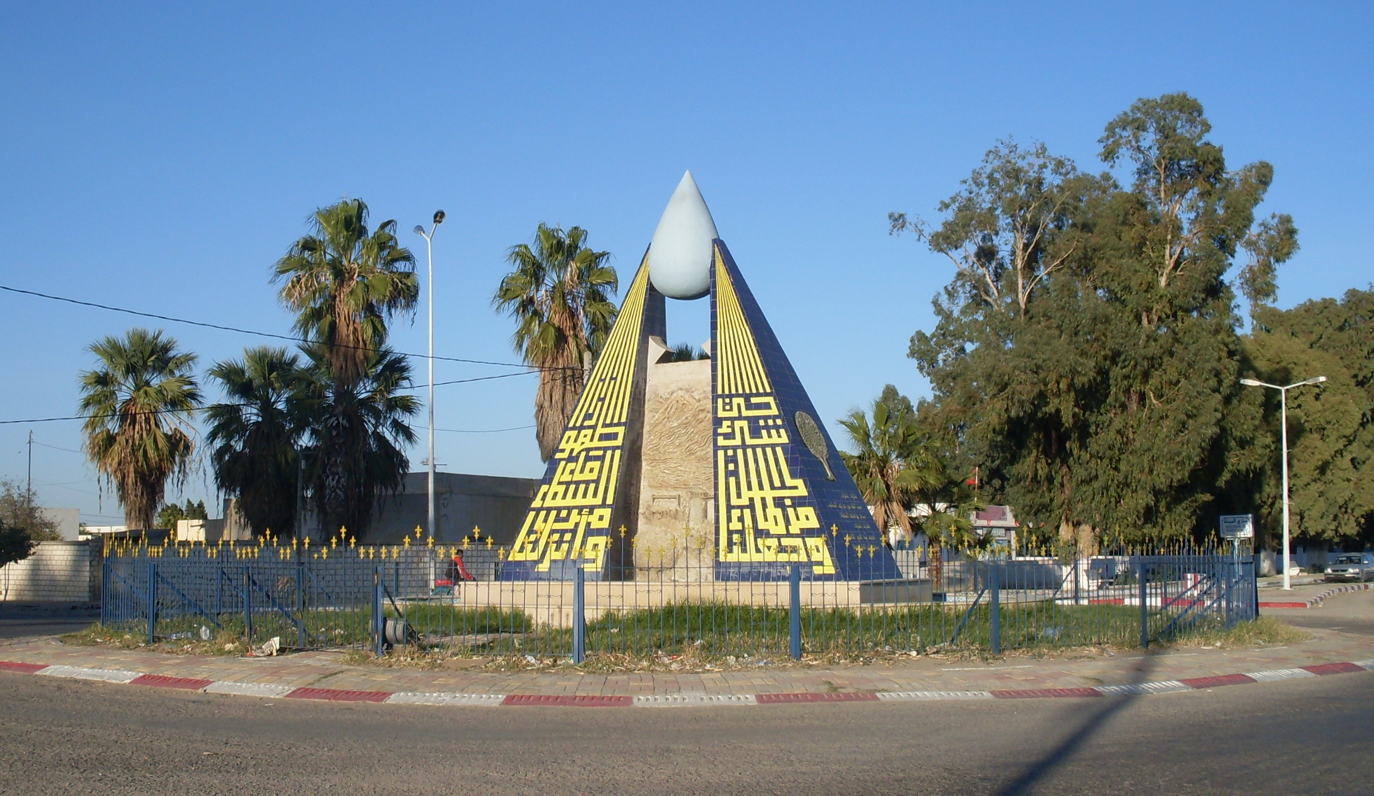 Entrée de la ville de Chebika aux environ de Kairouan